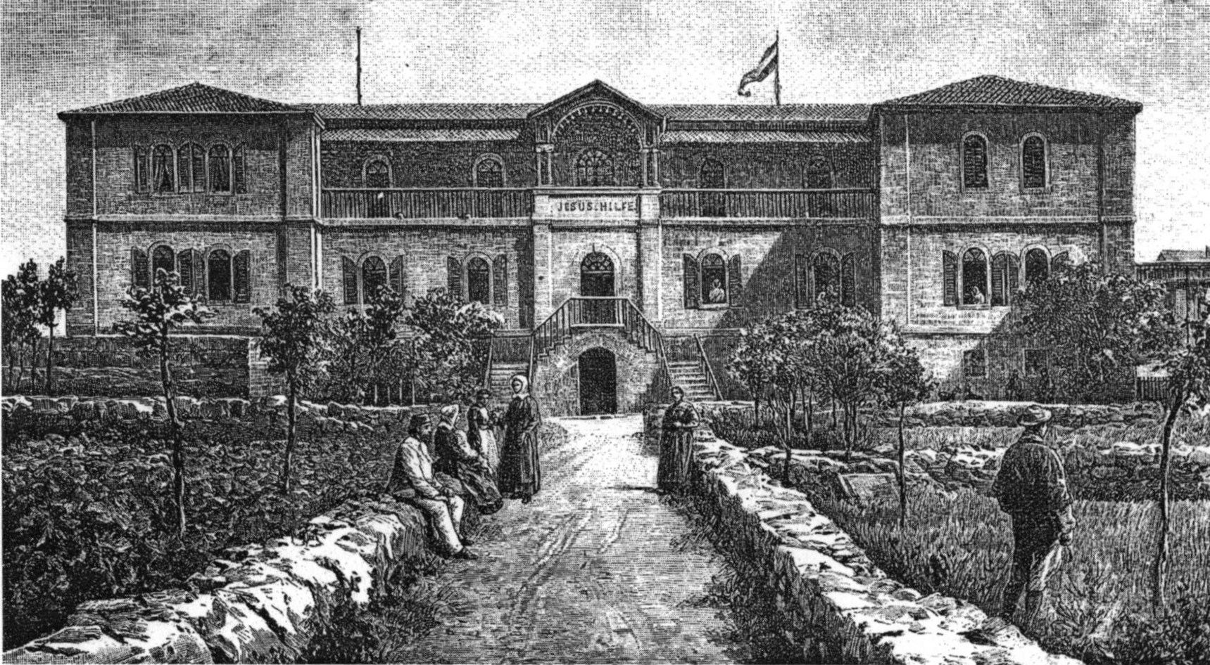 Zeitgenössische Postkarte kurz nach dem Bau des Hansen House in Jerusalem